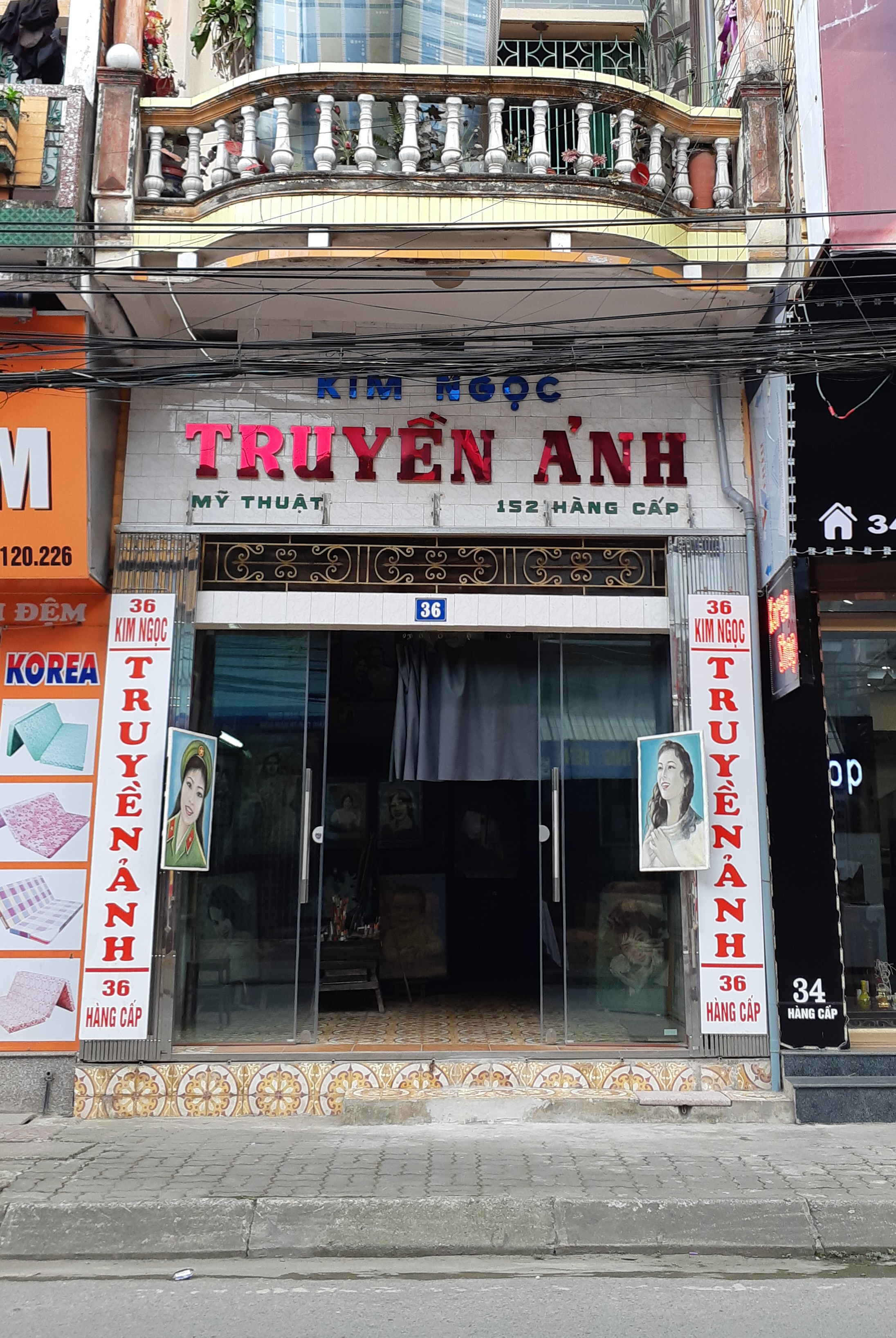 Nhà vẽ truyền thần Kim Ngọc nằm trong khu phố cổ Thành Nam, số 36 Hàng Cấp, thành phố Nam Định, tỉnh Nam Định.